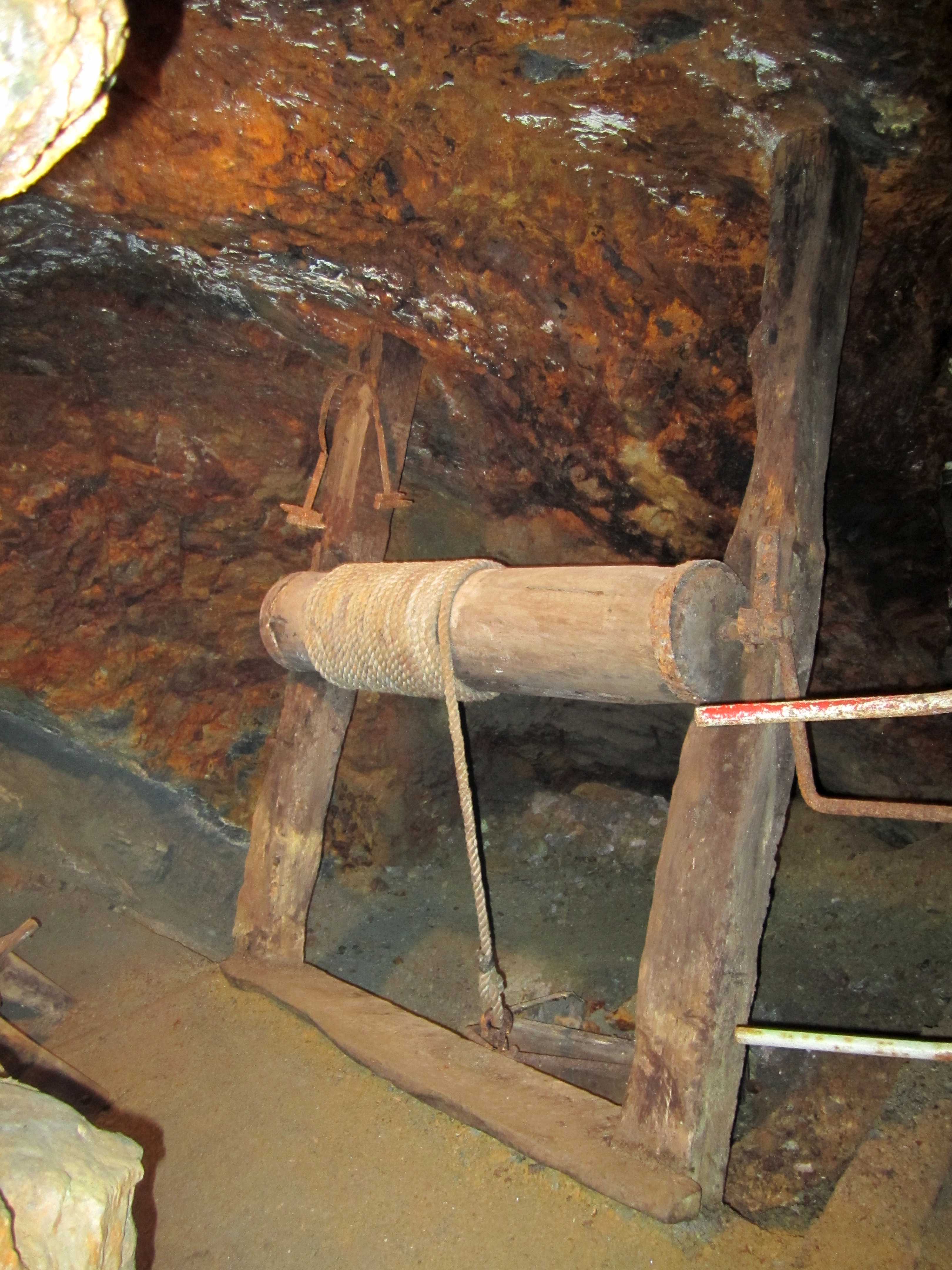 Mit Originalteilen rekonstruierte untertägige Hornstatt der Grube Glasebach. Straßberg, Sachsen-Anhalt, Deutschland.